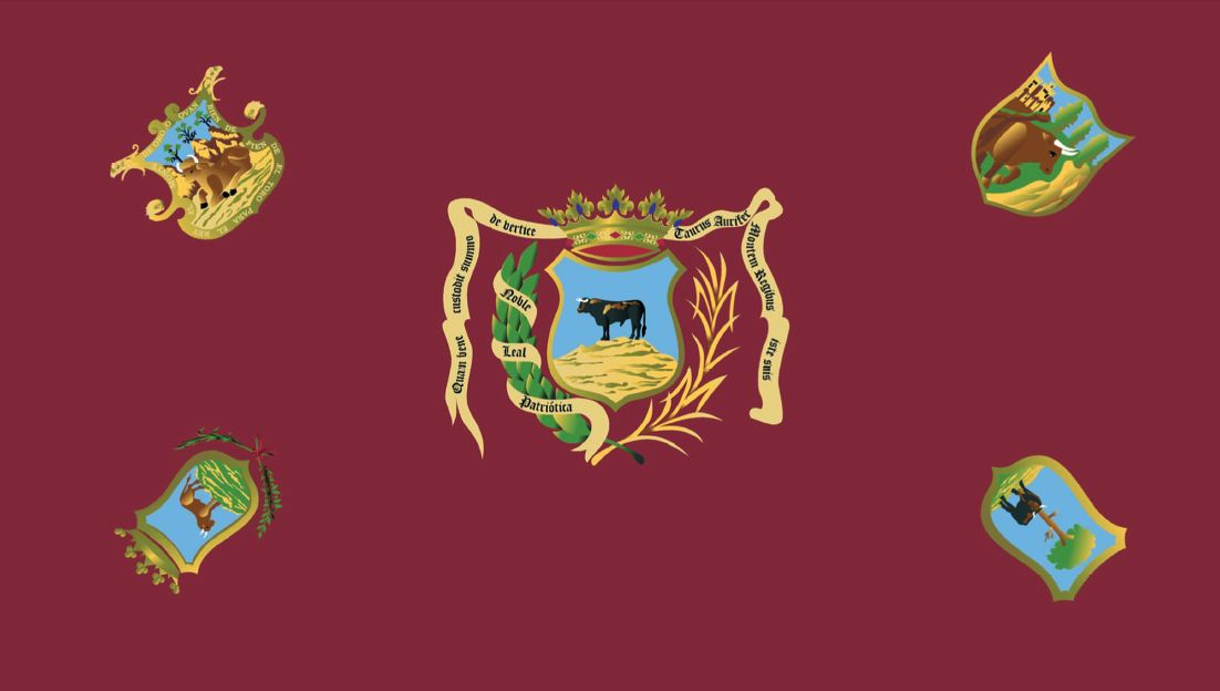 Bandera de la Ciudad de Montoro, Córdoba